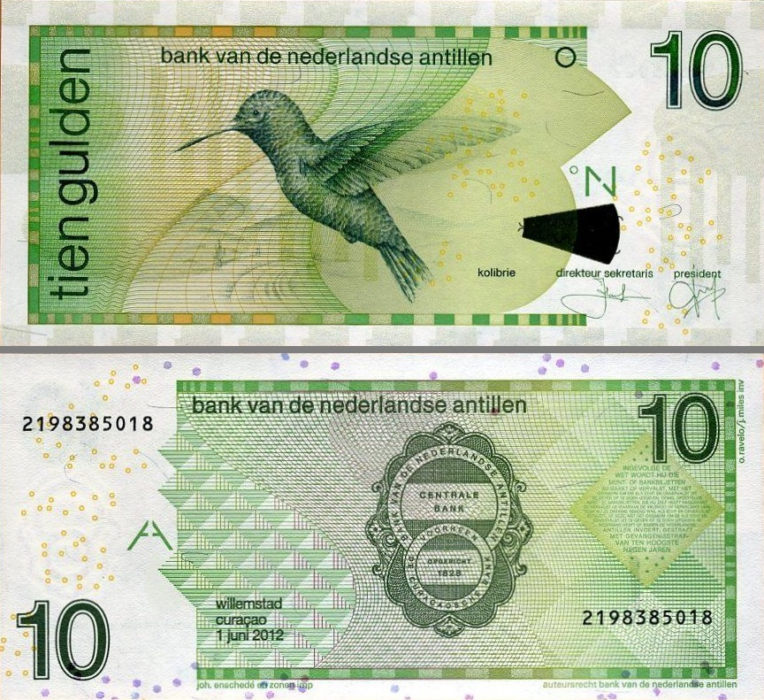 10 guldenów antylskich, 2012